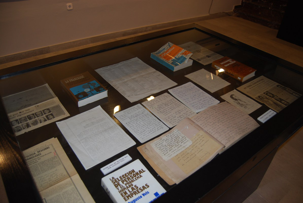 Vista de una de las vitrinas del Colección Museográfica de Grafología de Agusto Vels